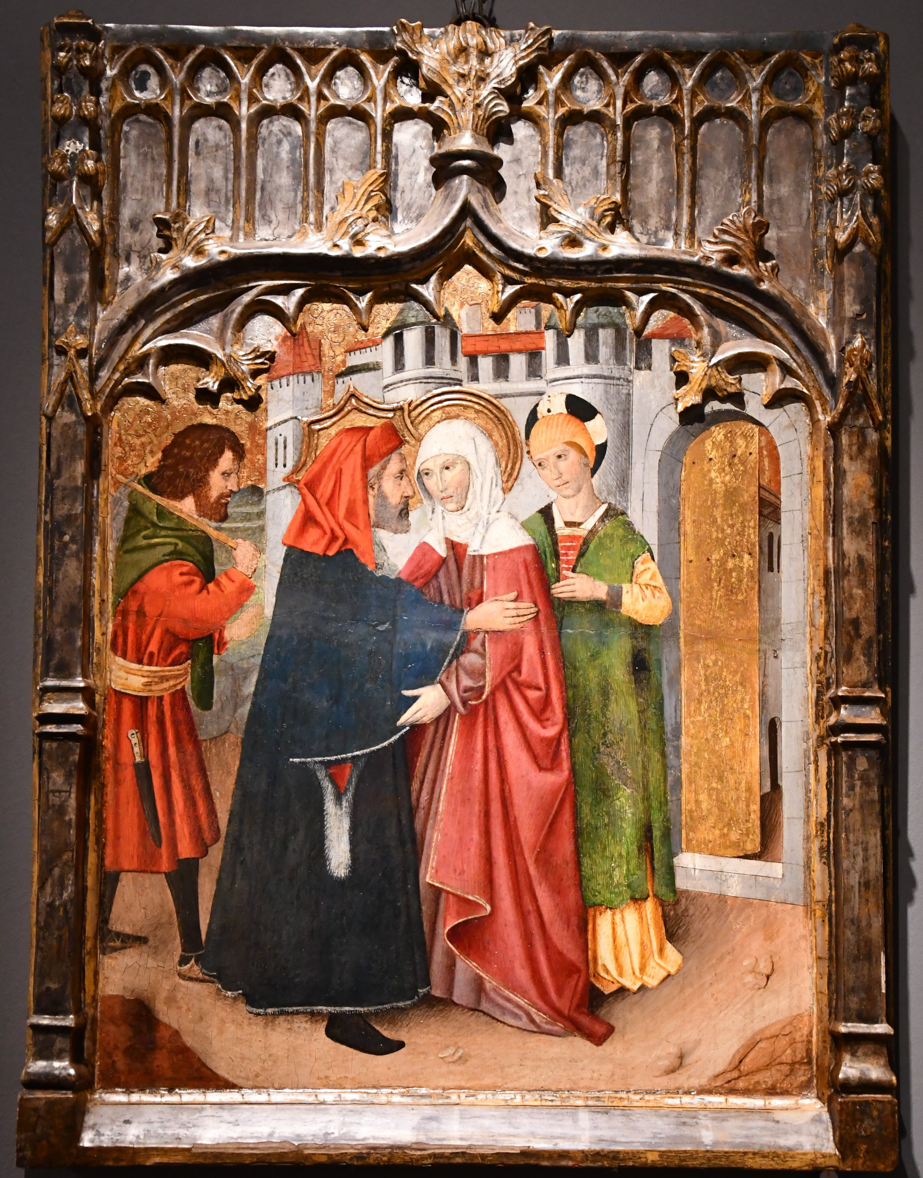 Taules de la predel·la del retaule de santa Anna, de sant Bartomeu i de santa Magdalena. Procedeixen de l'església de Sant Martí de Pertegàs de Sant Celoni (Vallès Oriental)